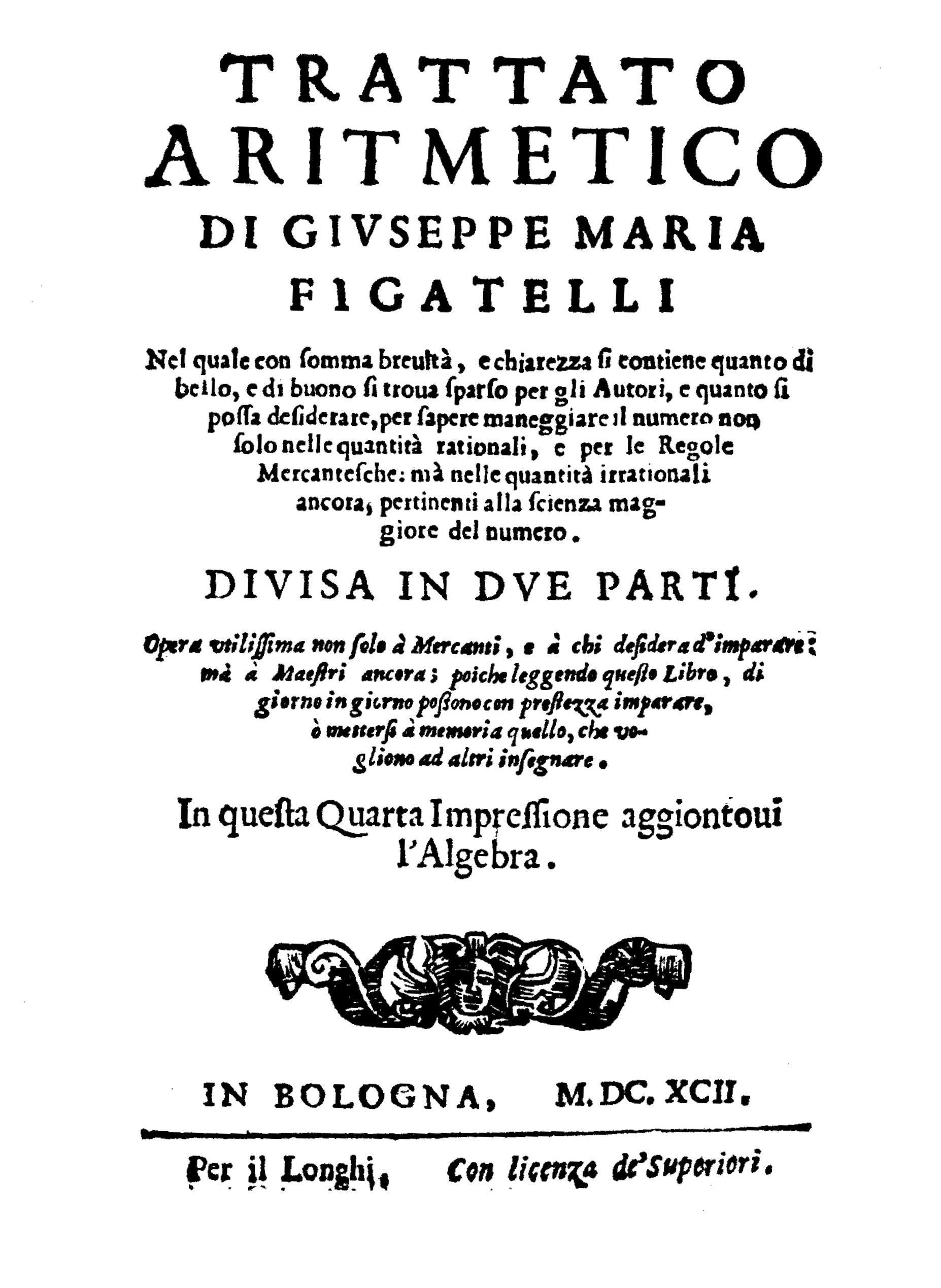 Frontespizio